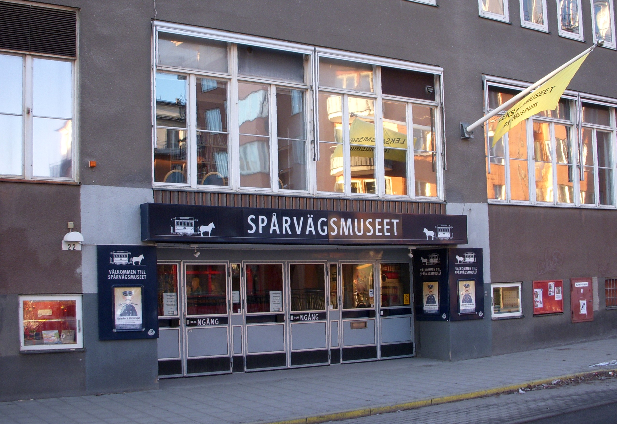 Spårvägsmuseet i Stockholm